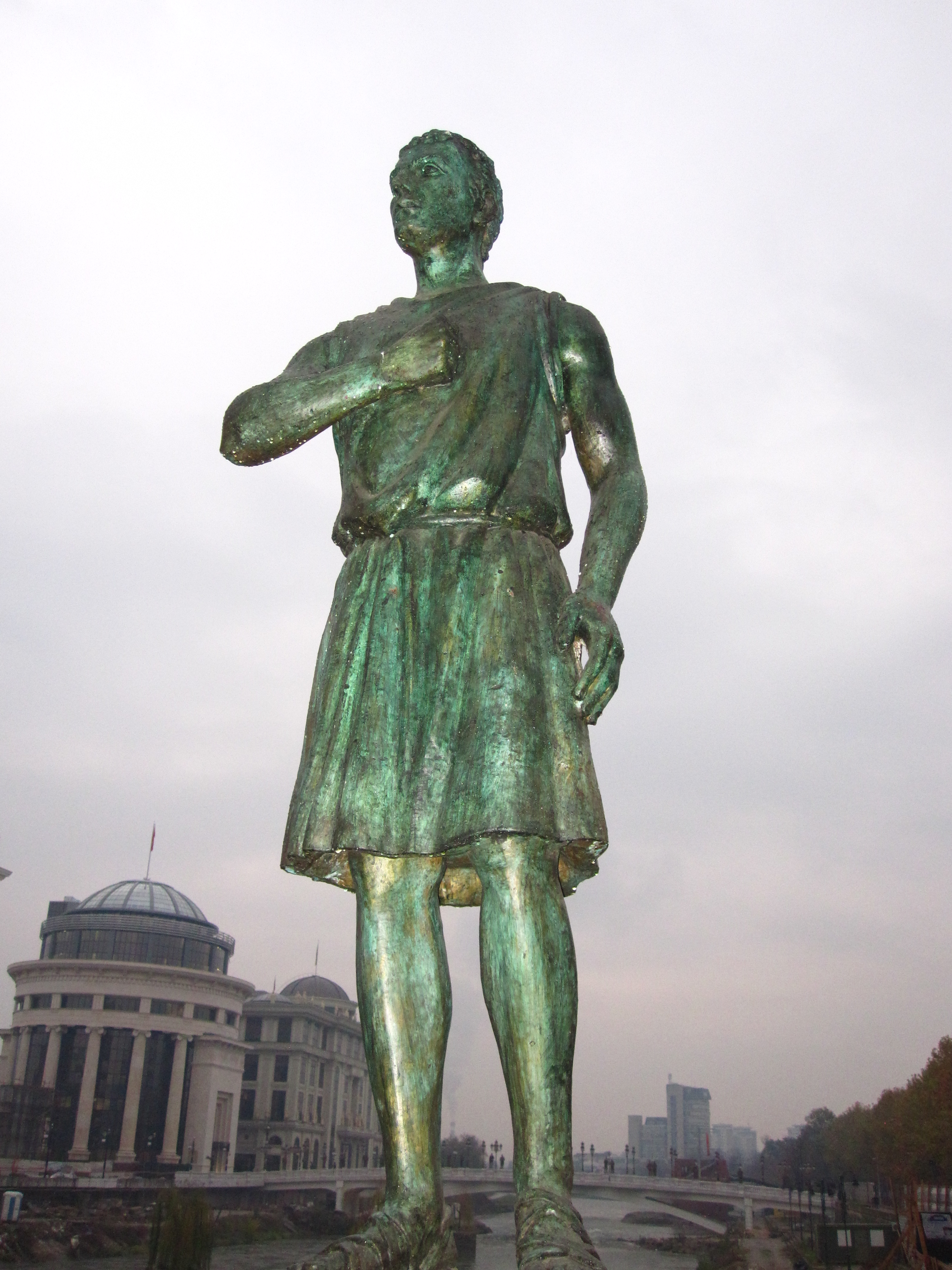 Споменик - Парменион во Скопје.